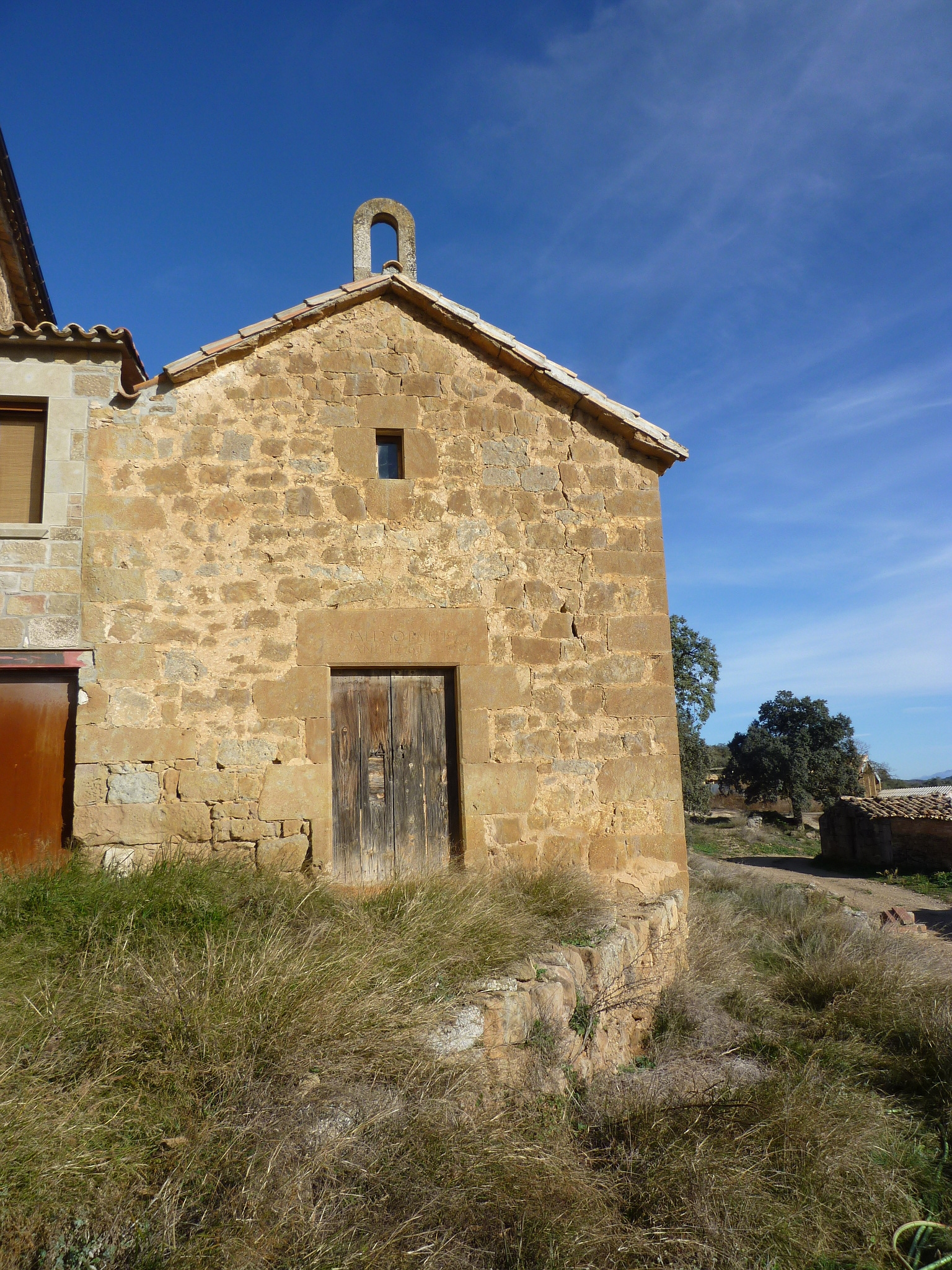 Mas Garriga de les Cases de la Serra (Torrefeta i Florejacs): capella